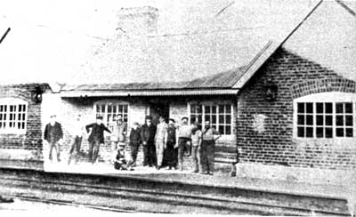 Los empleados en la estación Trelew sobre la plataforma en 1915.